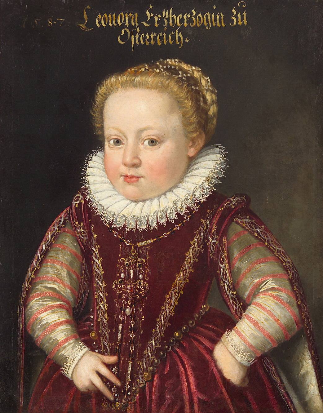 Halbfigur